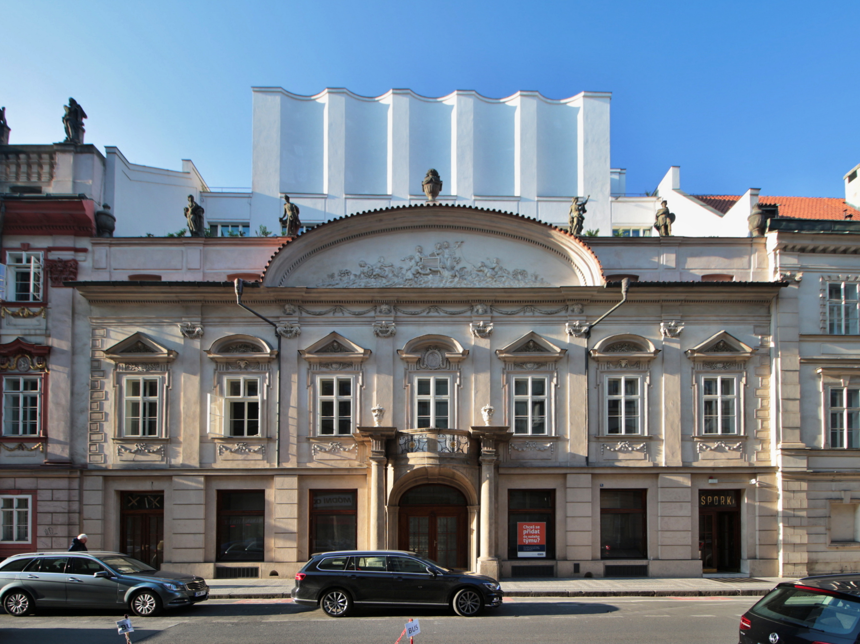 Praha-Hybernská ulice, klasicistní část Swéerts-Šporkova paláce